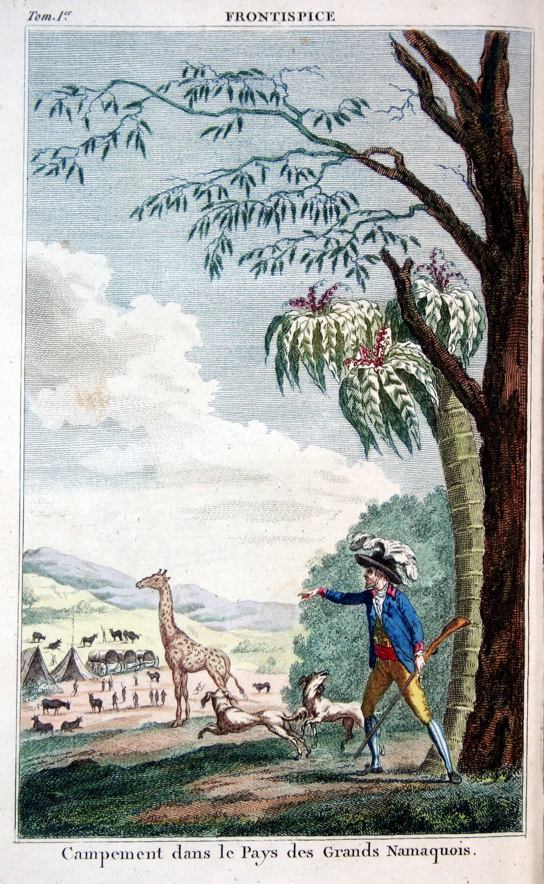 Frontispice du Voyage de F. Le Vaillant dans l'intérieur de l'Afrique par le cap de Bonne Espérance nouvelle édition, Desray, An VI.